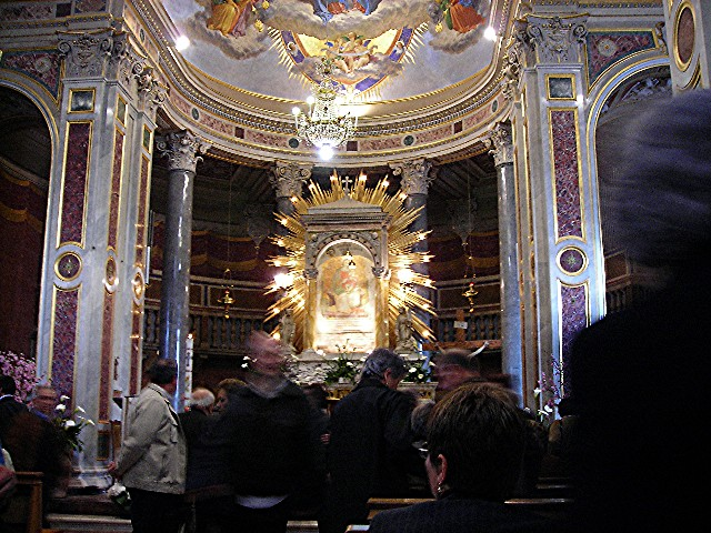 Abside of the Madonna della Stella, Montefalco, Perugia, Umbria, Italy